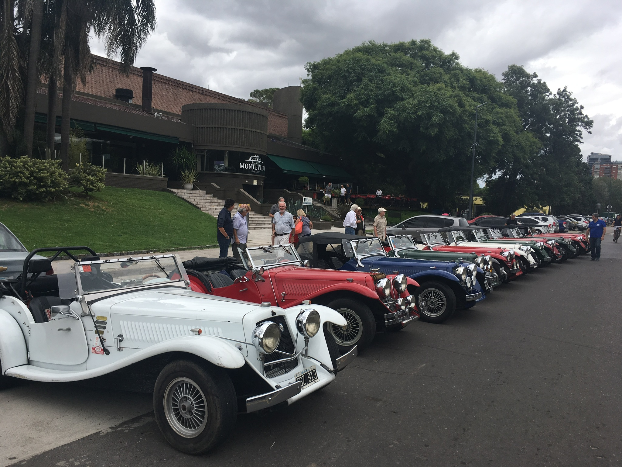 Palermo 2017